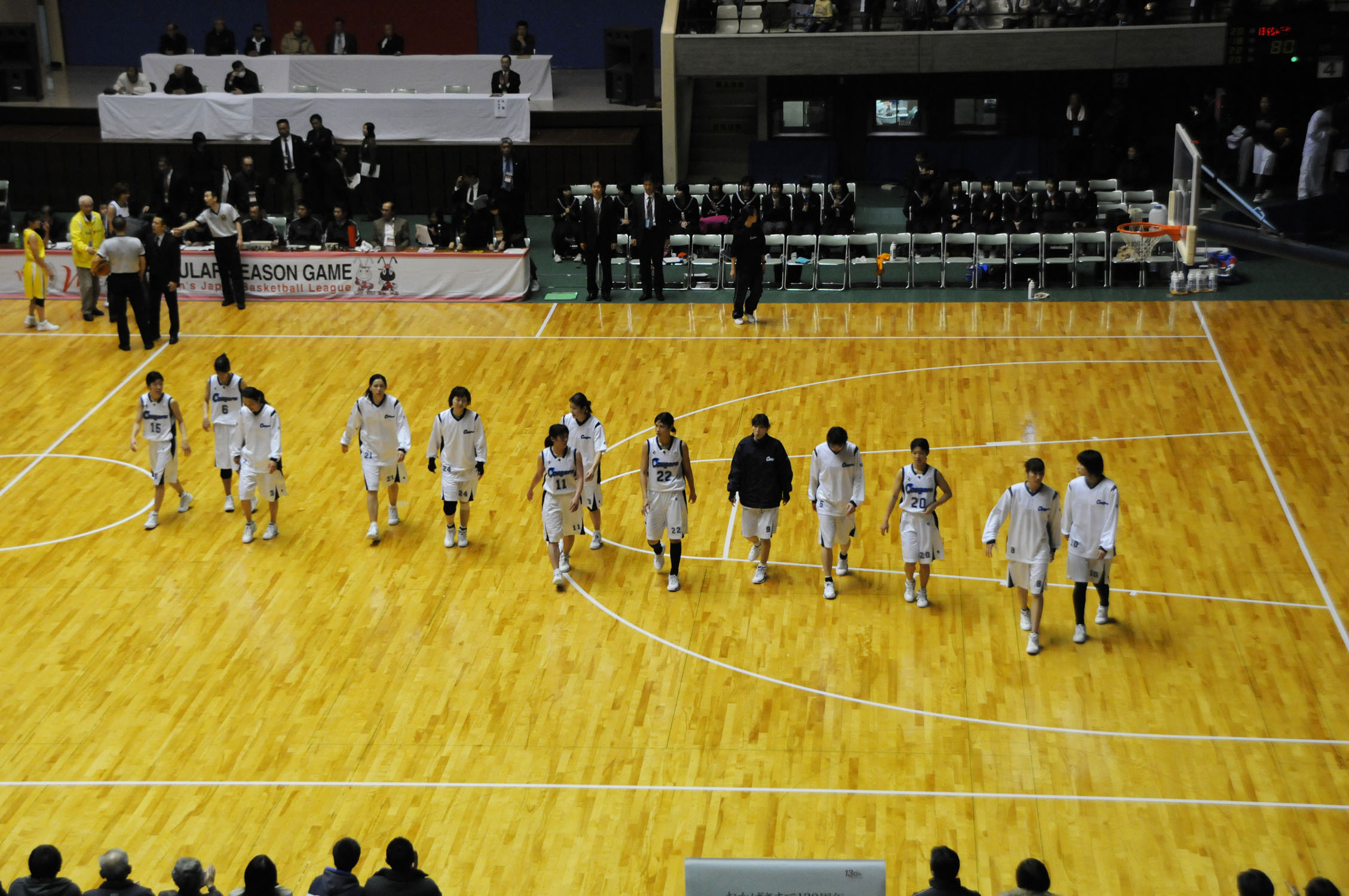 日立ハイテク クーガーズ。秋田県立体育館で。